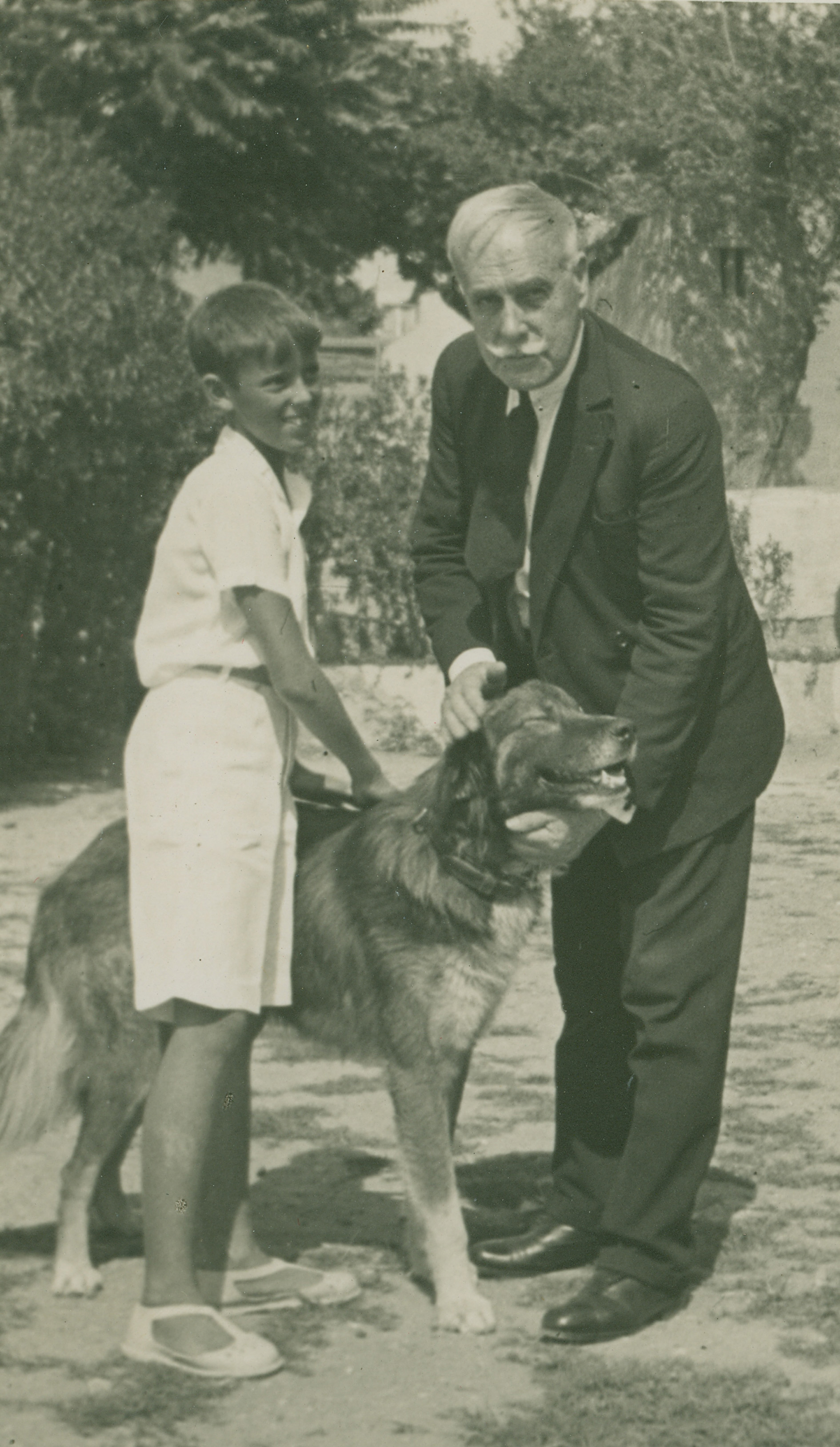 Henrique Paiva Couceiro e sobrinho Zinho na sua casa de Oeiras